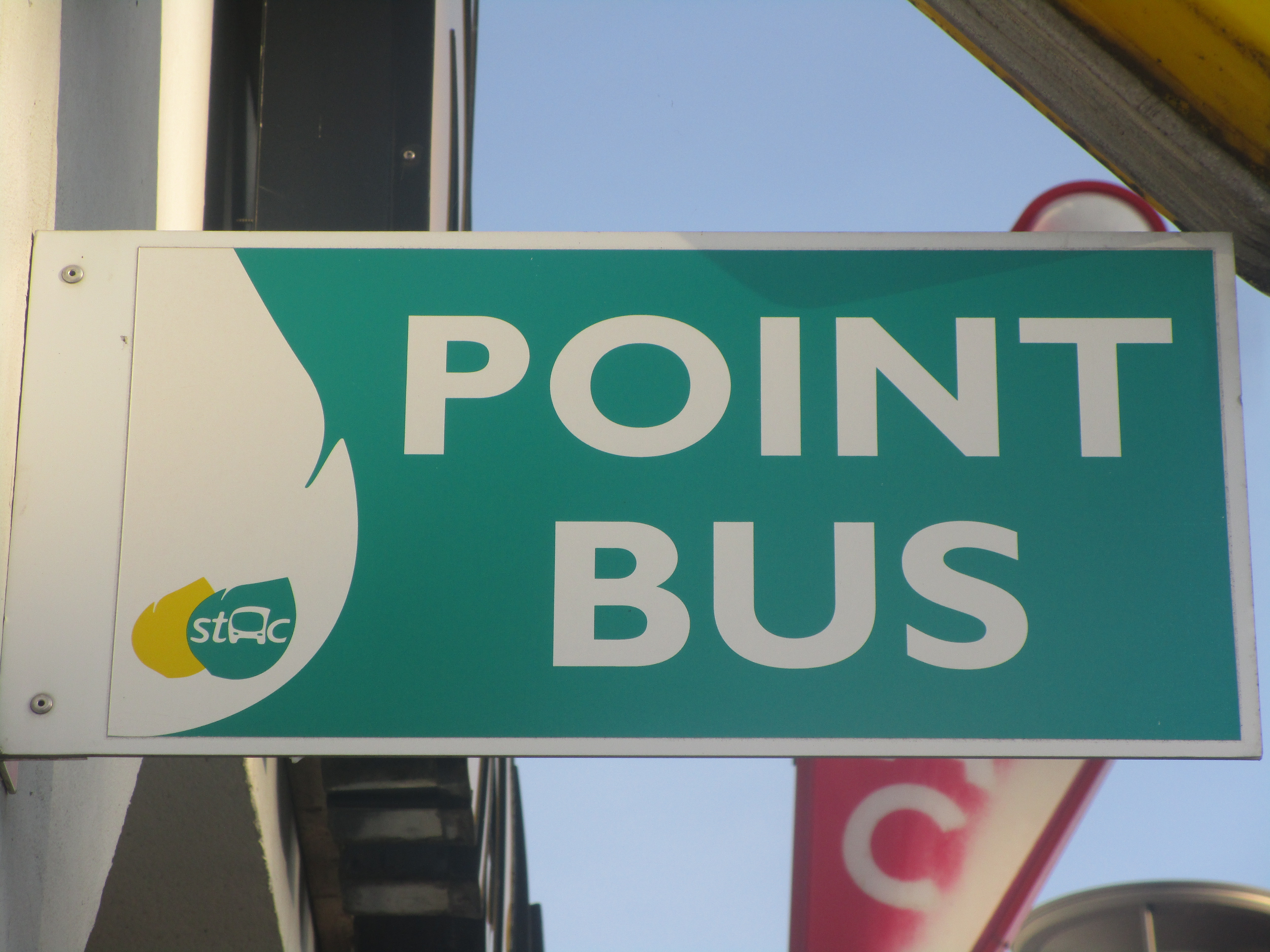 La plaque apposée sur les Points Bus, ici le bureau de tabac de Challes-les-Eaux, du réseau de bus Stac (Chambéry).